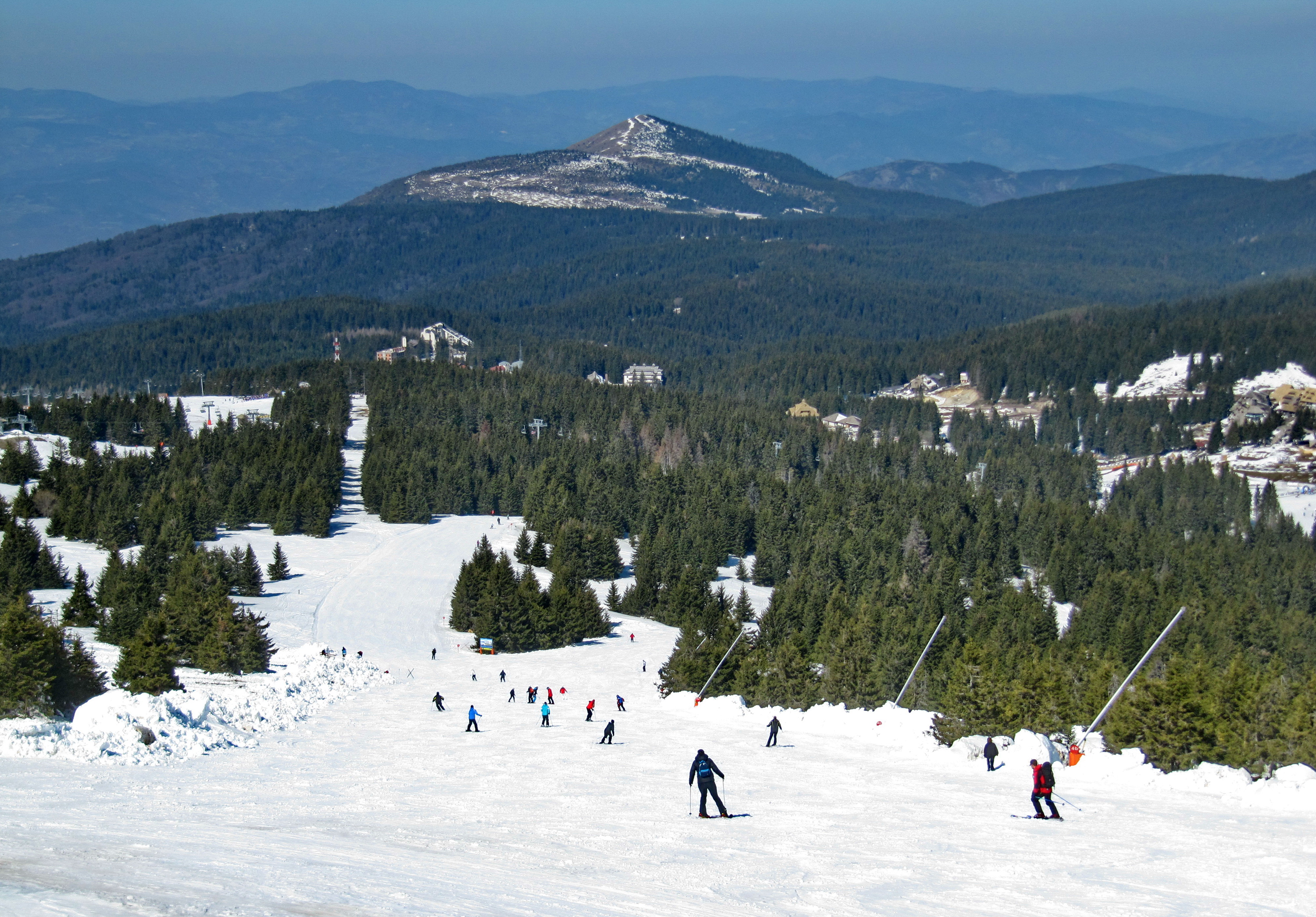 Kopaonik ski staza